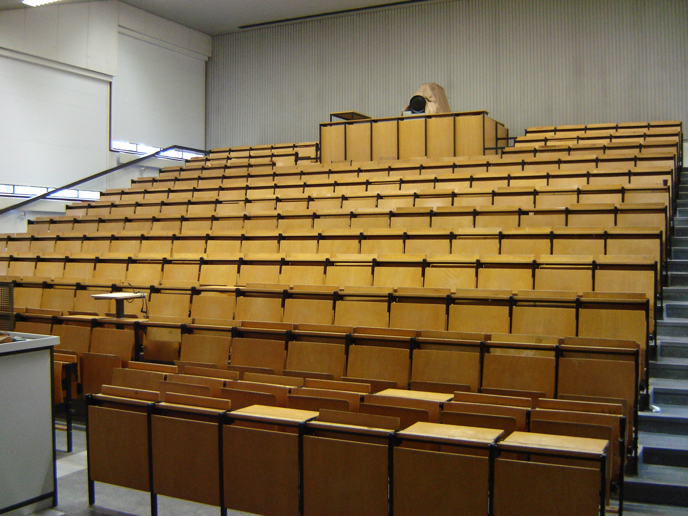 Hörsaal an der Justus-Liebig-Universität Gießen (Raum B030 im Phil II)